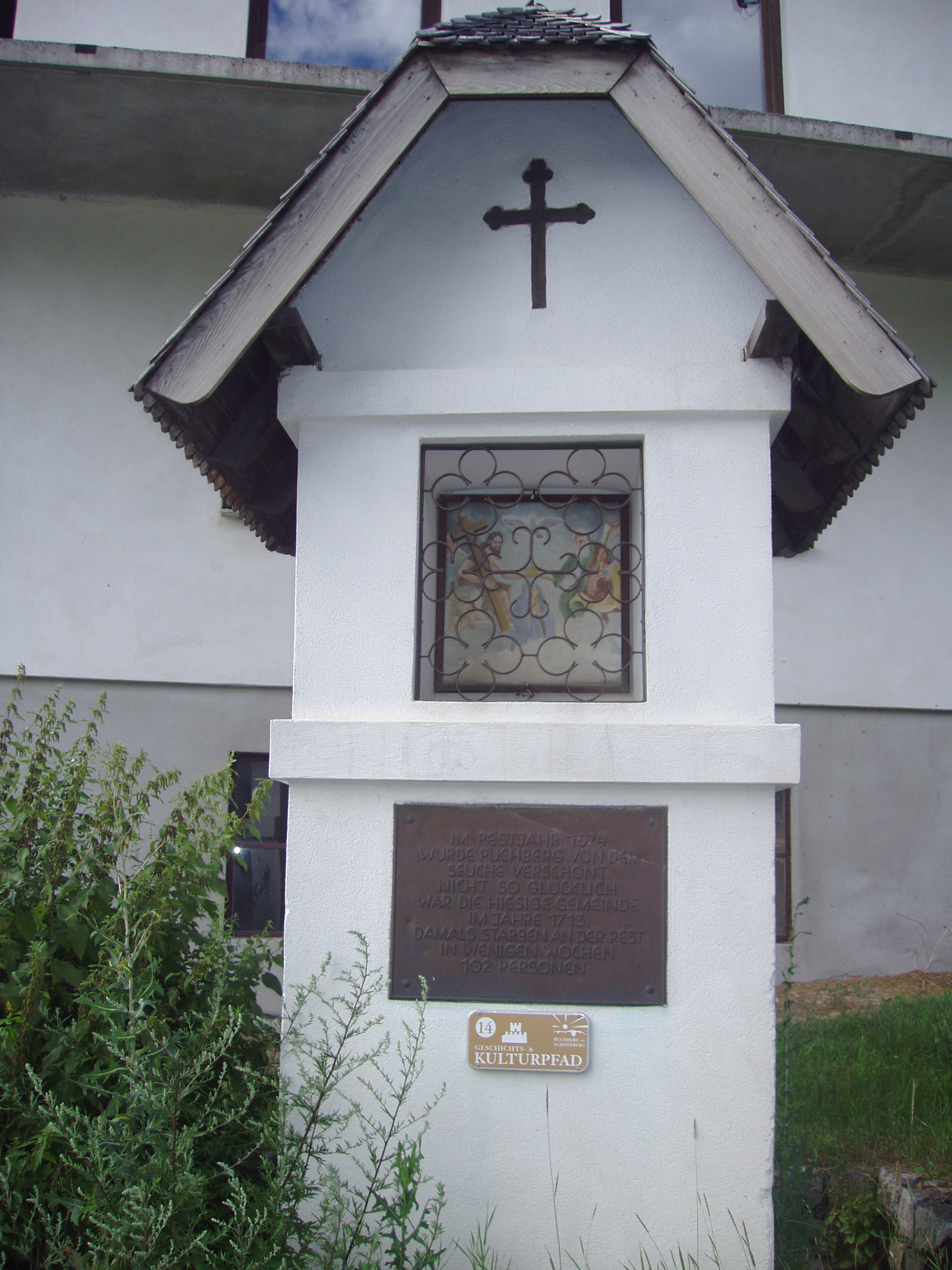 Der Bildstock zu den Geschnissen der Pest in Puchberg am Schneeberg